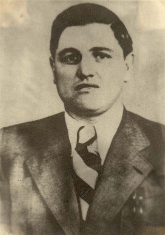 Феликс Ландау (нем. Felix Landau; 21 мая 1910 Вена, Австро-Венгрия — 20 апреля 1983) — гауптшарфюрер СС (de: SS-Hauptscharführer).